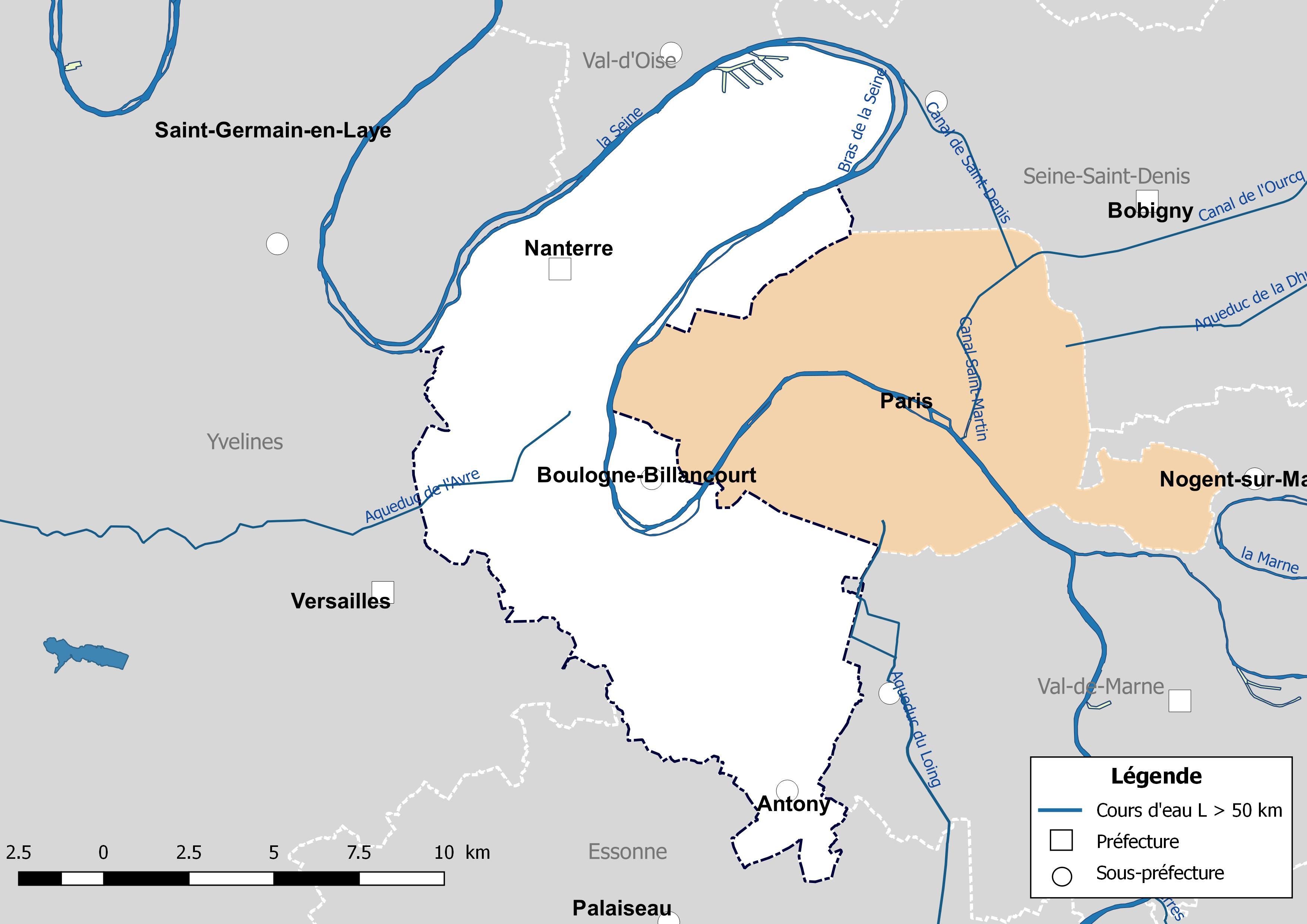 Carte des cours d'eau de longueur supérieure à 50 km drainant le département des Hauts-de-Seine (France).